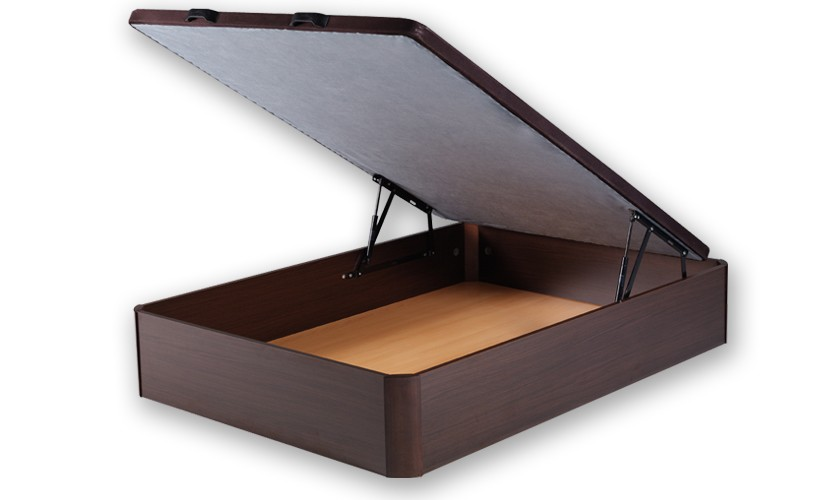 Canapé de madera de estilo moderno